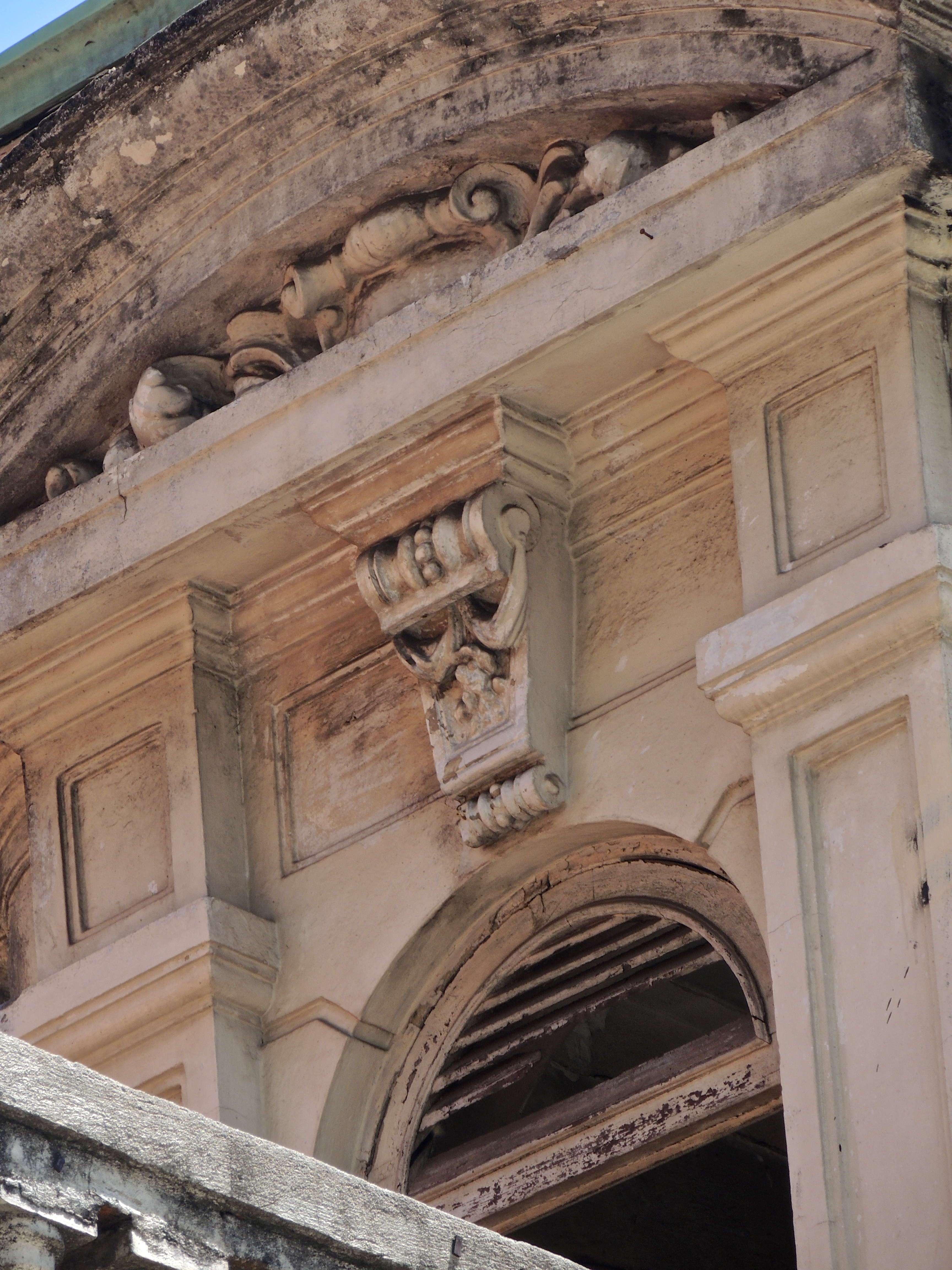 Detalhe sobre janela da residência Joaquim Franco de Melo, na avenida Paulista, São Paulo (SP), Brasil.